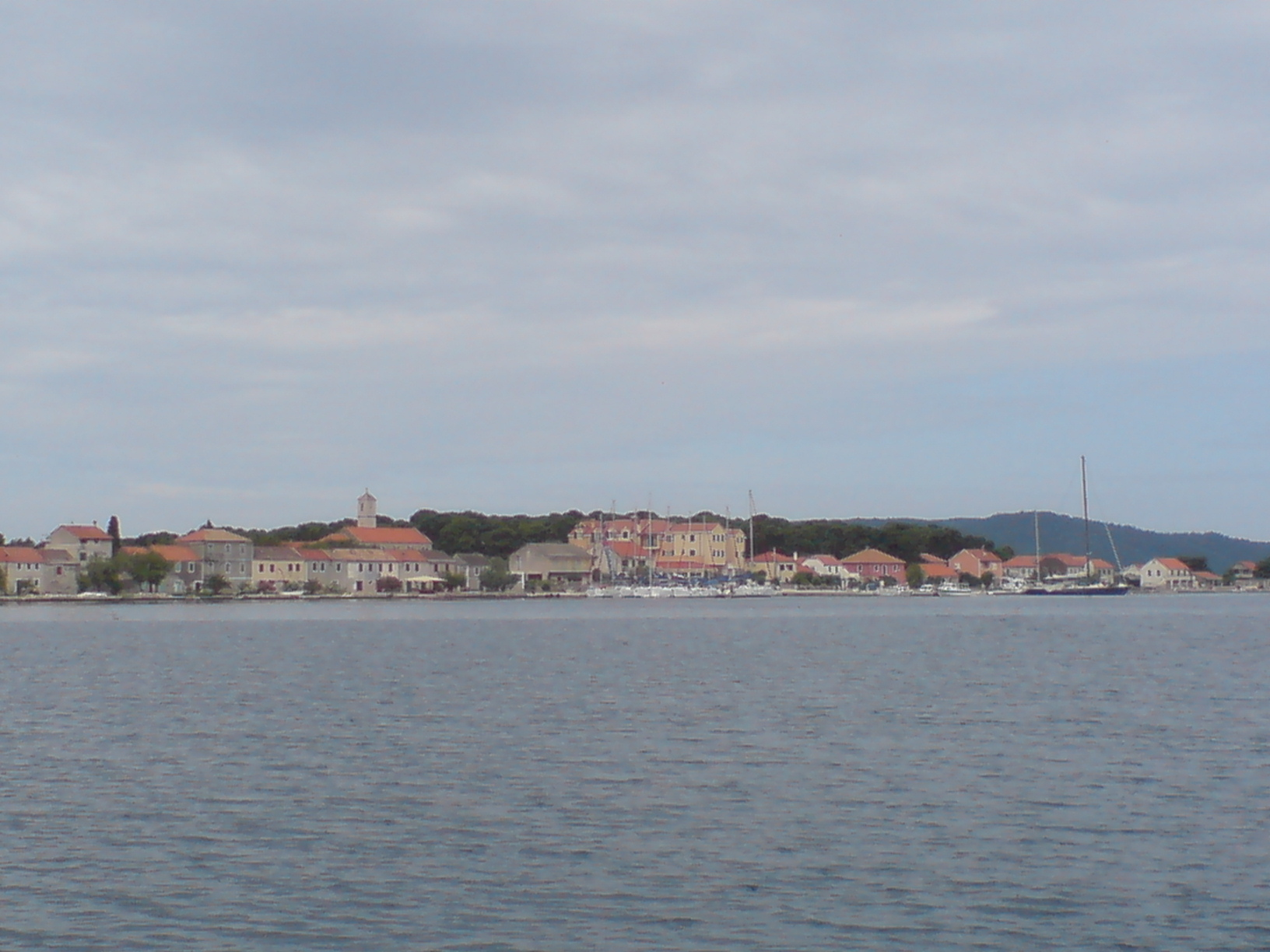 Krapanj island, near Šibenik (Croatia)